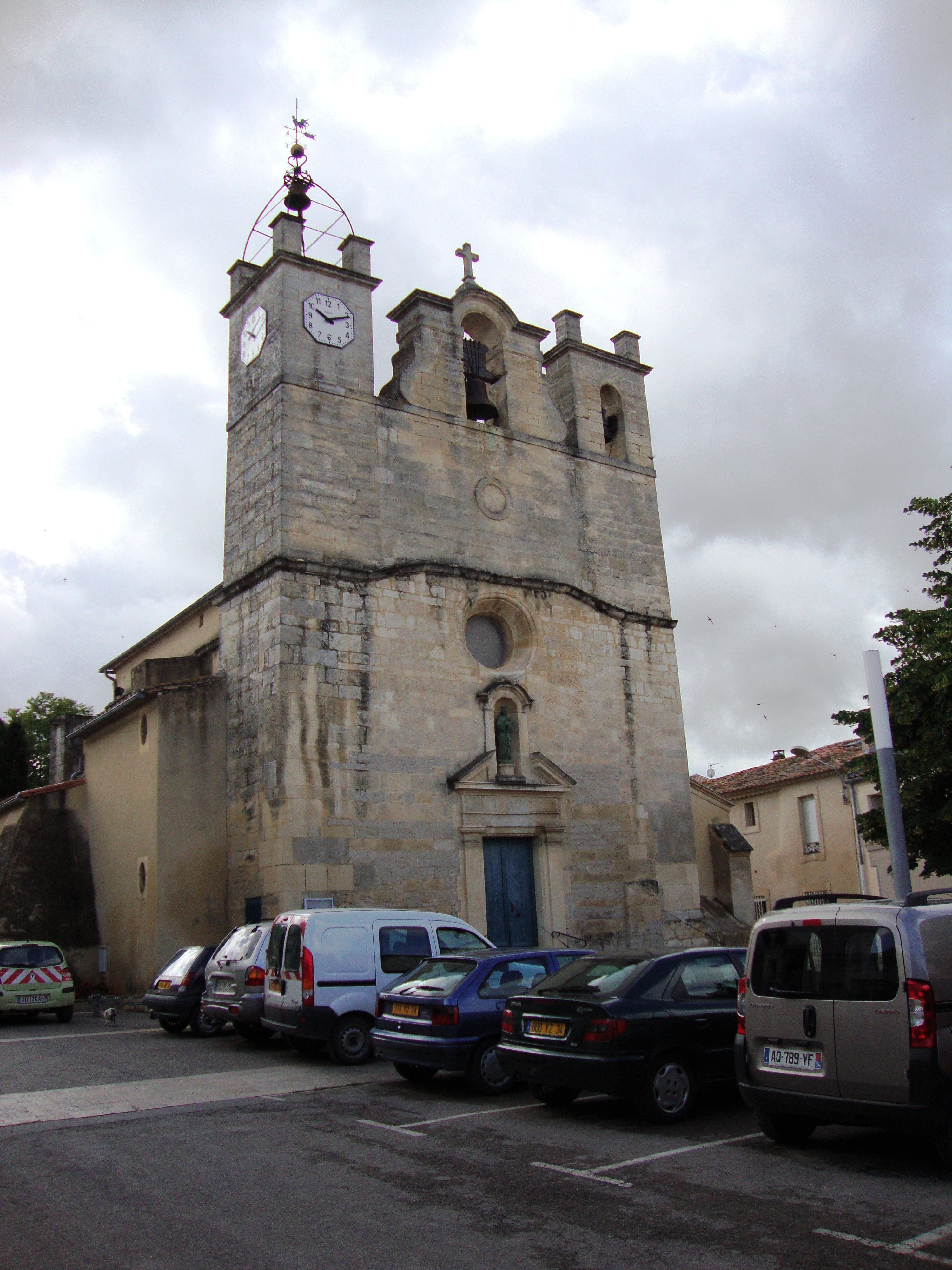 Mudaison (Hérault, Fr), l'église Saint-Ascicle et Sainte-Victoire, sa façade.